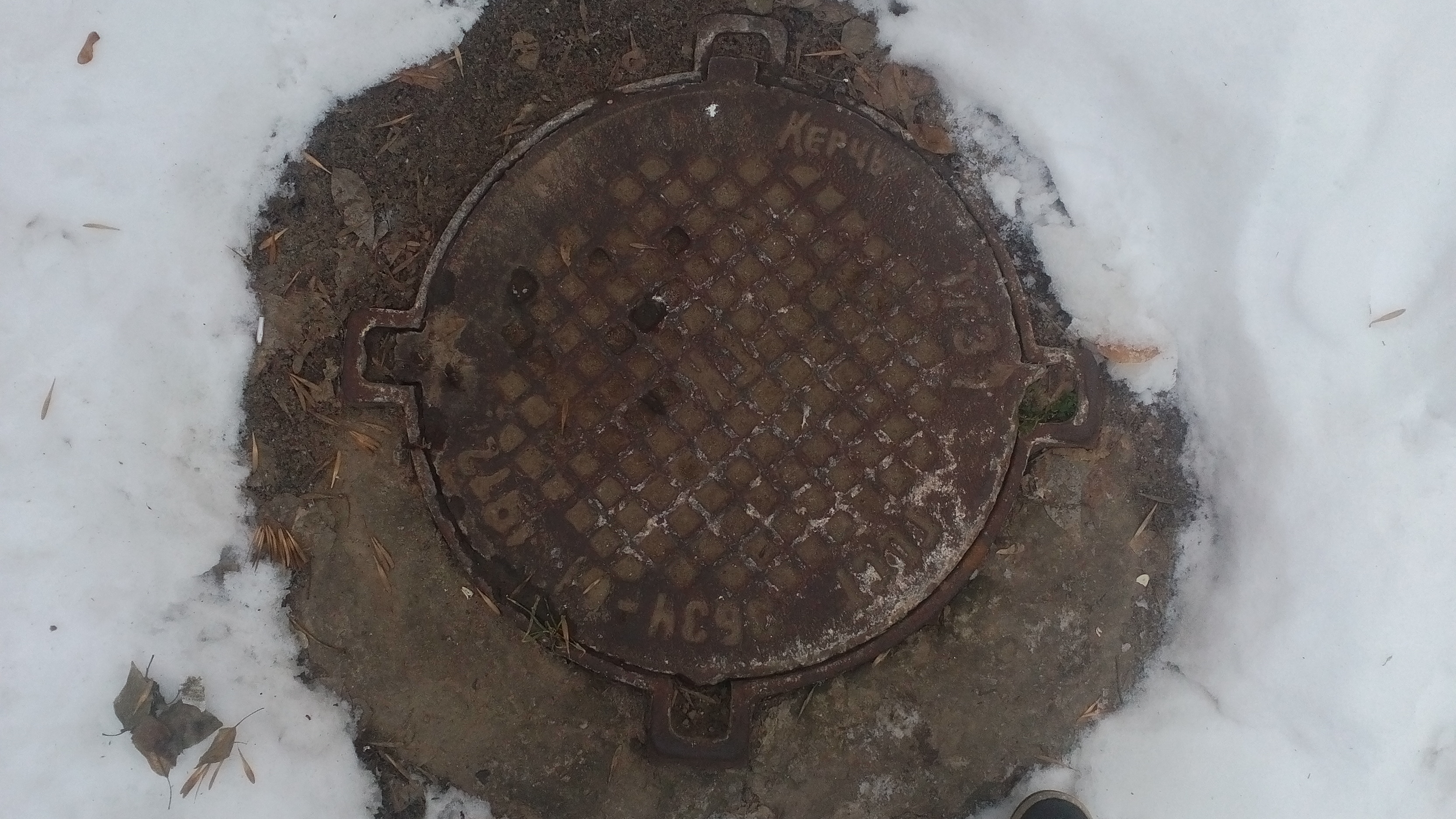 Канализационная крышка, город Каменск-Шахтинский